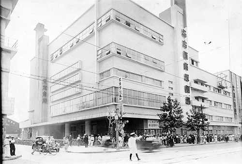 名古屋宝塚劇場（名宝会館）。前年の1935年開館。2002年に閉館している。